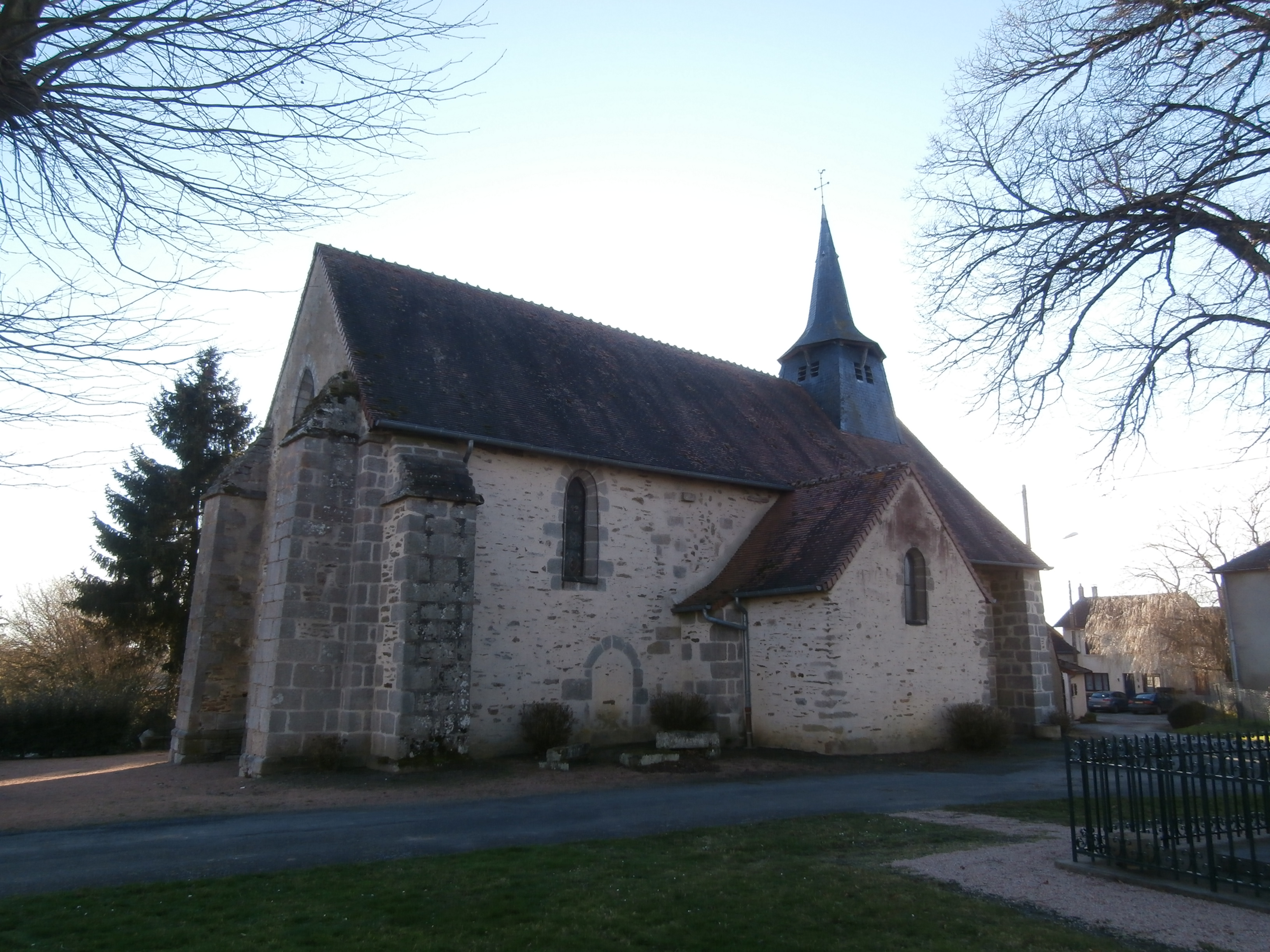 Eglise Saint Marien